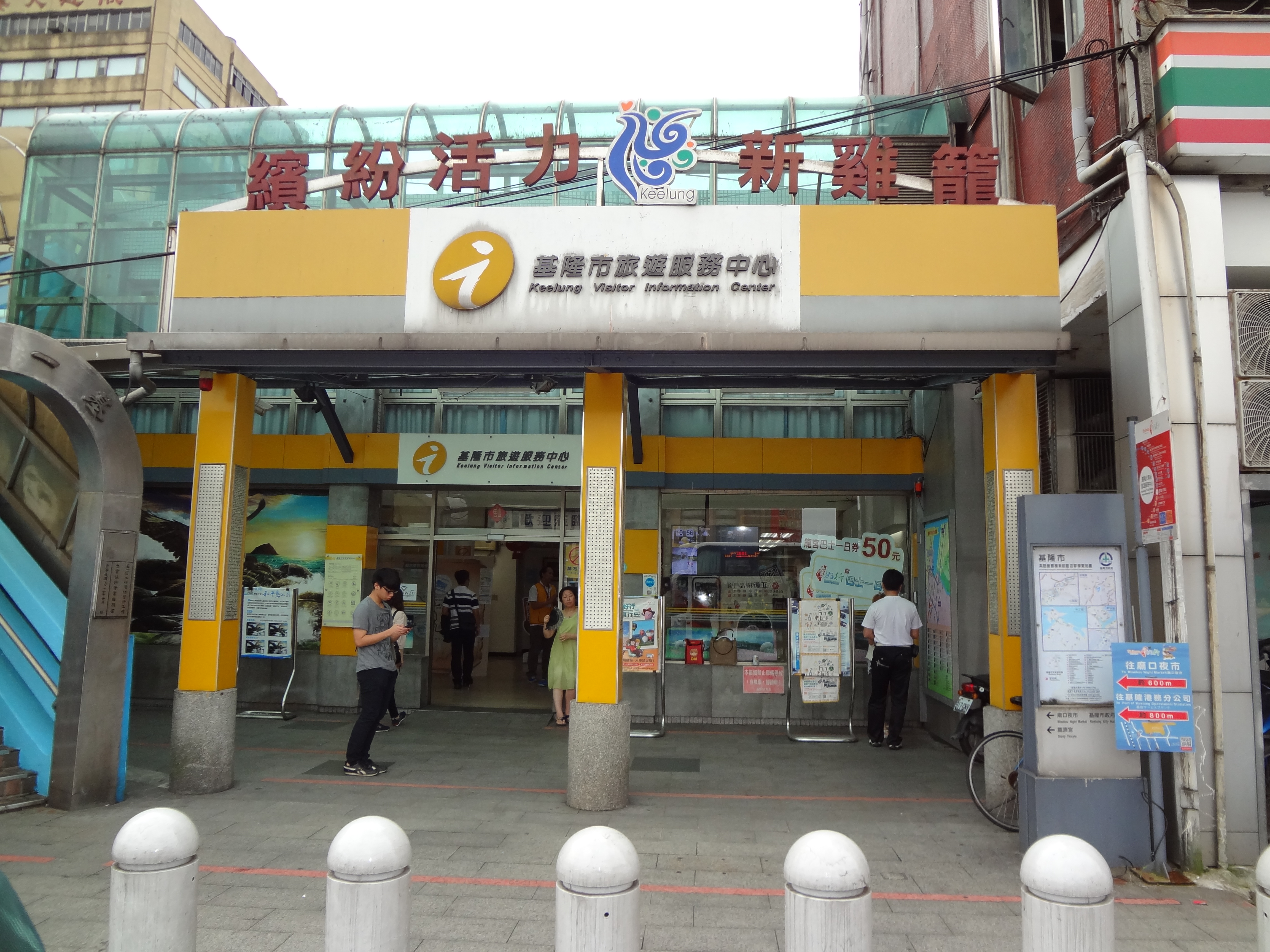 基隆市旅遊服務中心，由基隆市政府交通旅遊處管理維護，地址：基隆市仁愛區港西街1號。